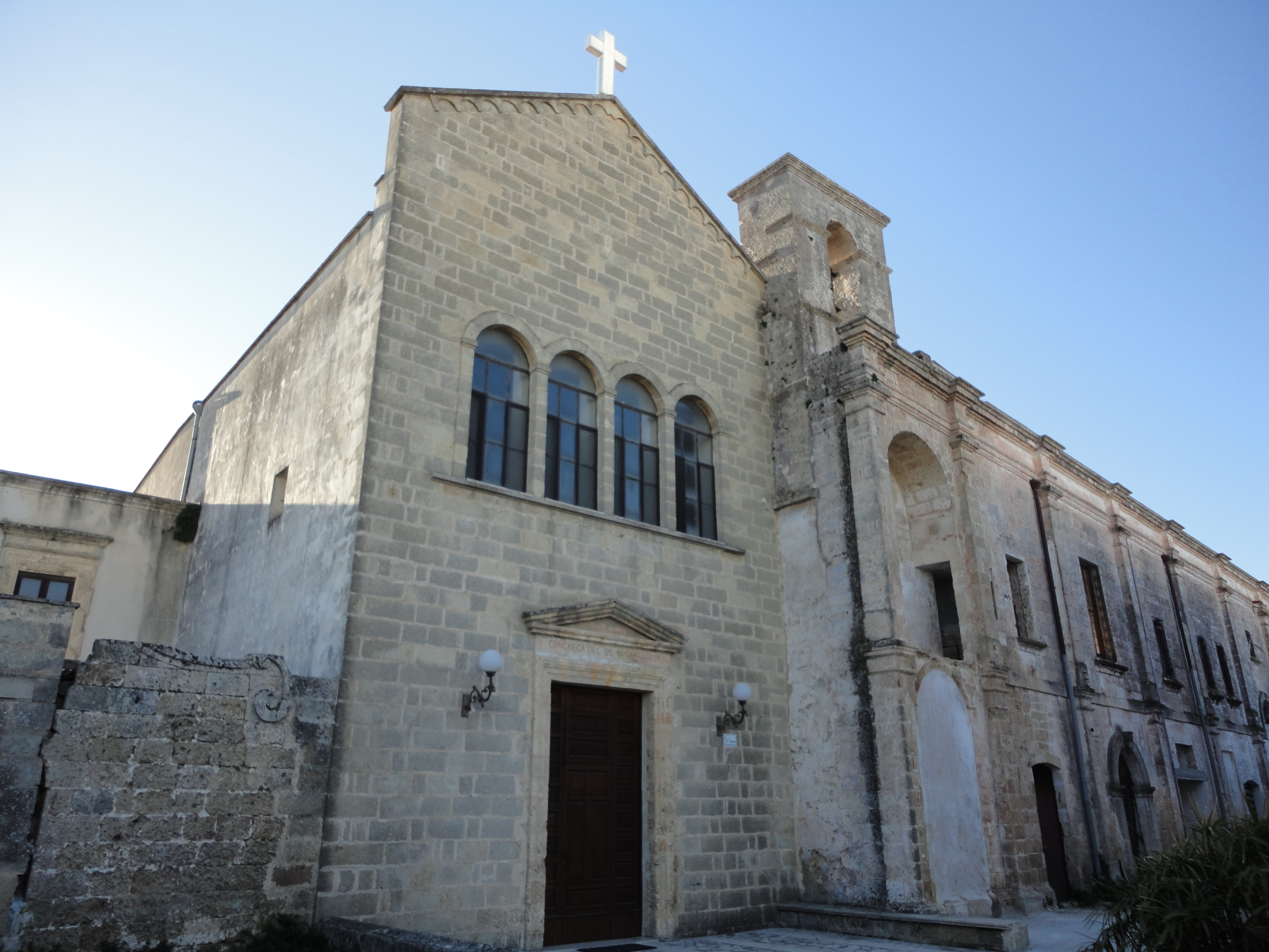 Chiesa di Sant'Antonio Alessano, Lecce